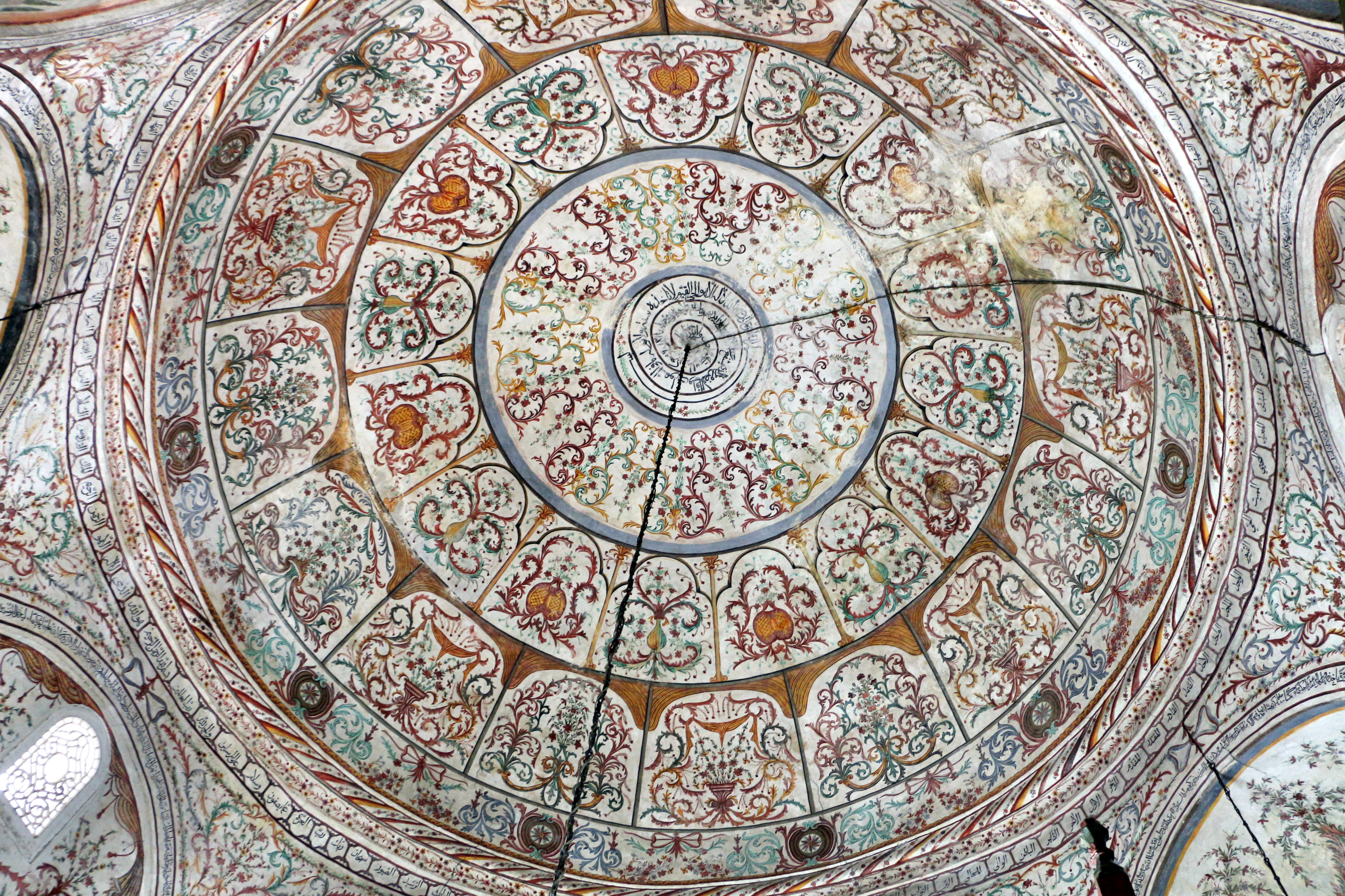 Xhamia e Ethem Beut